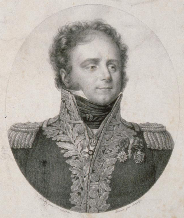 Frédéric-Sigismond de Berckheim (1775-1819)